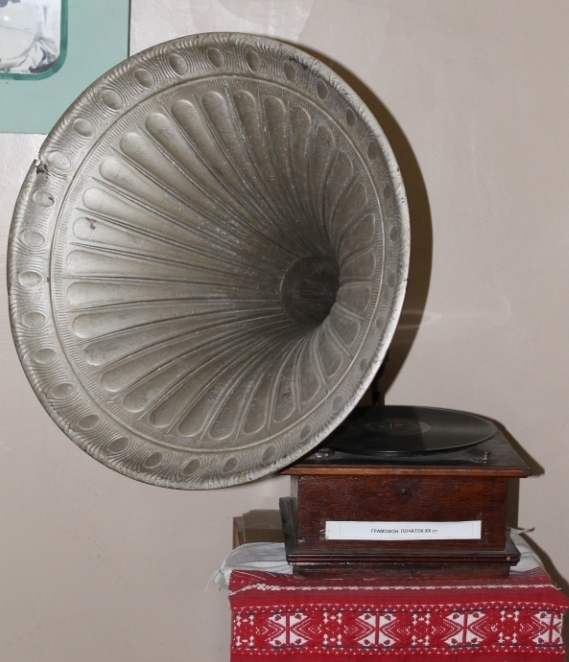 грамофон, в музеї музичних інструментів, м. Ужгород